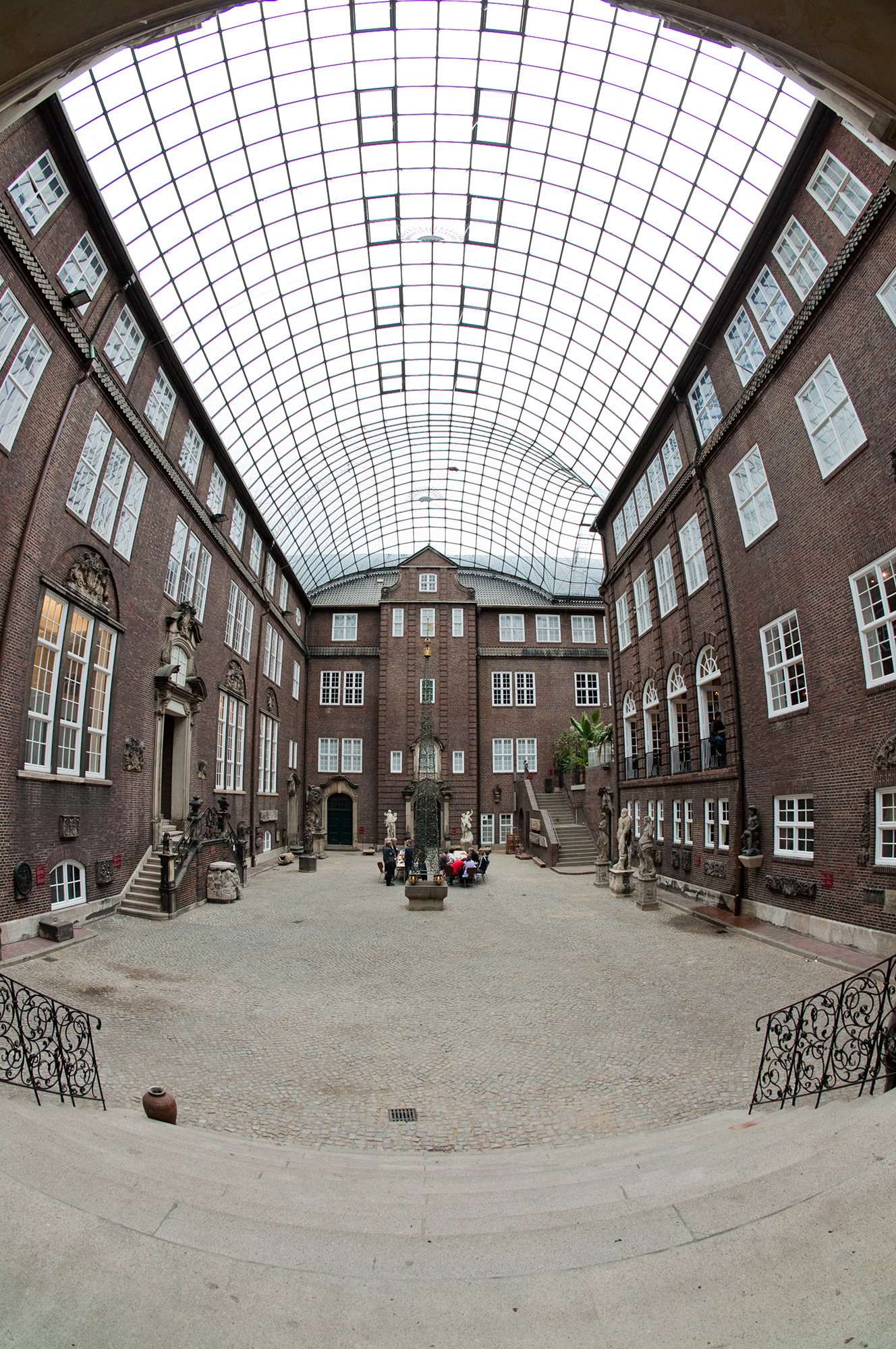 Innenhof des Museums für Hamburgische Geschichte